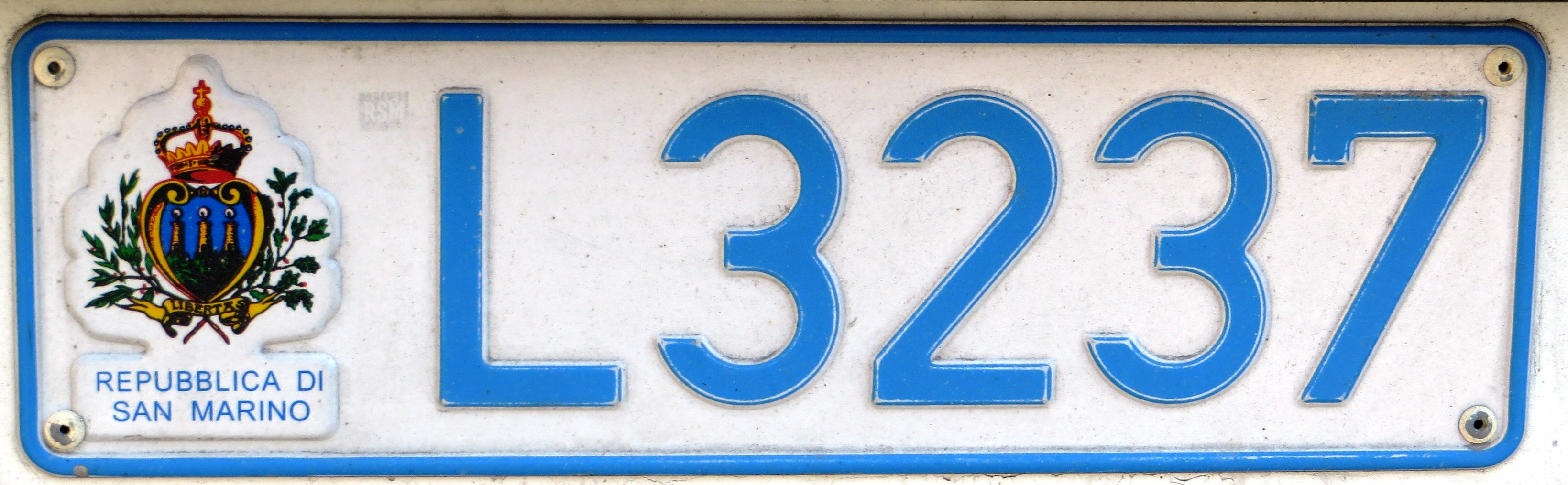 kentekenplaat San Marino